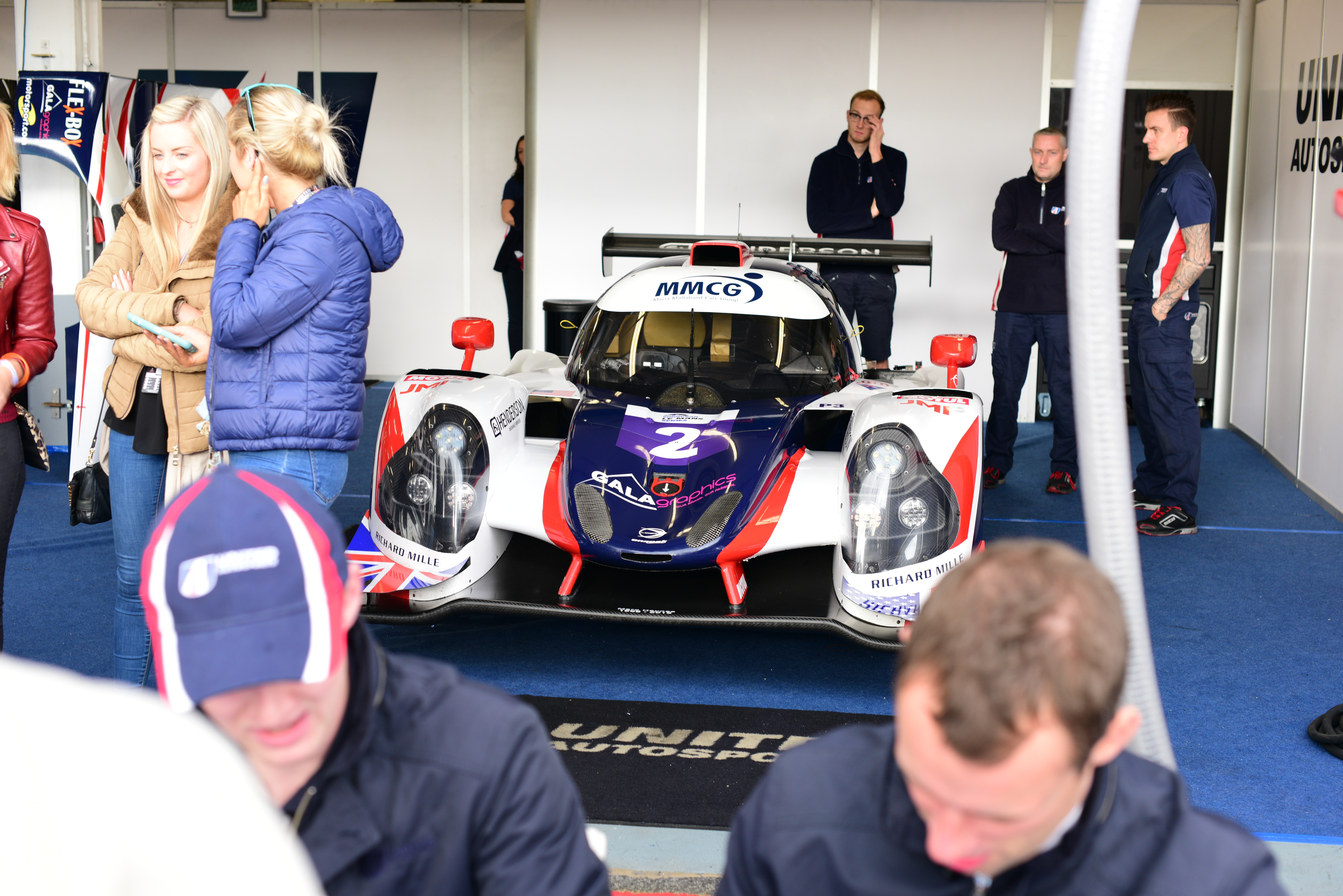 ELMS - 2016 - 4 Horas Estoril - Portugal